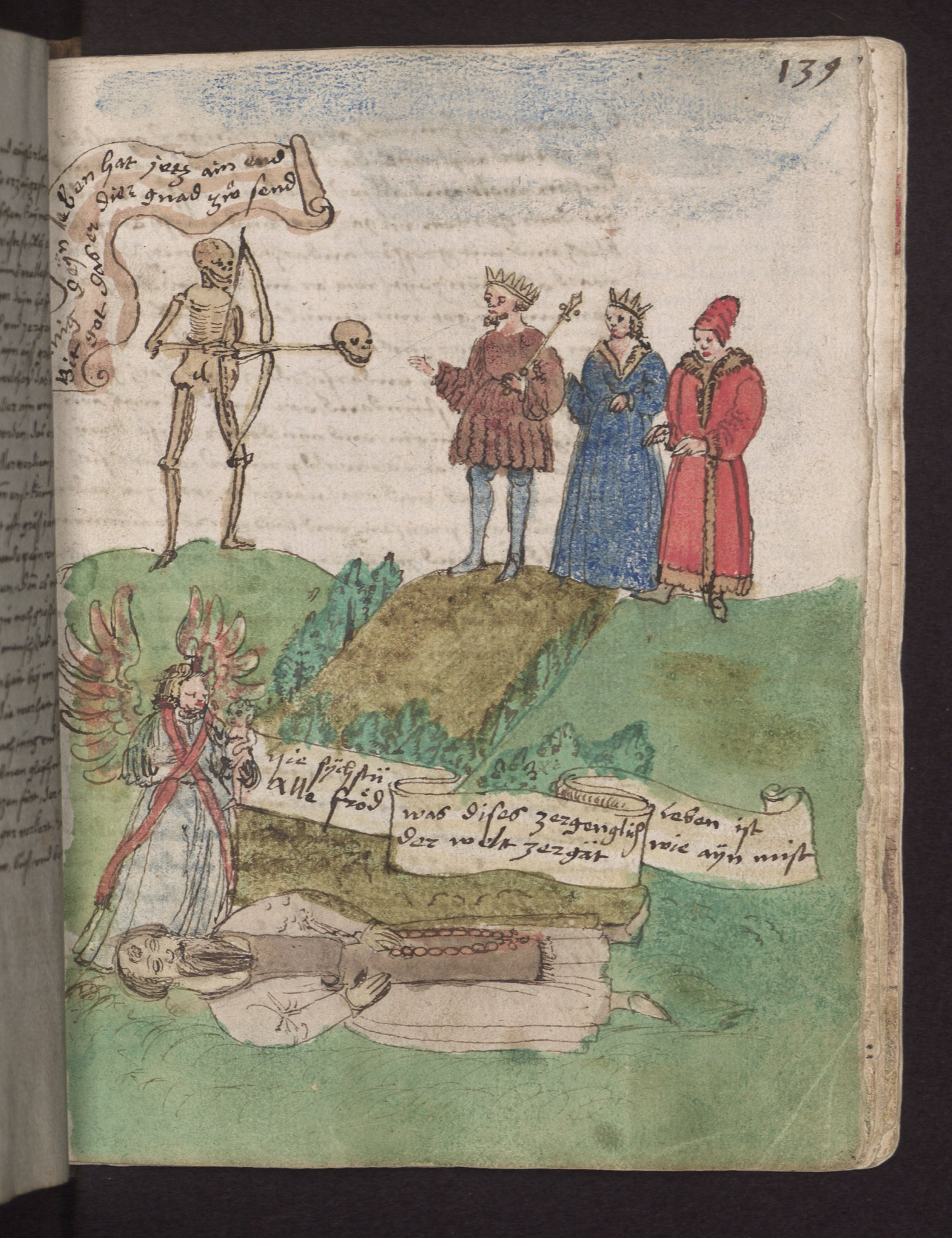 Seite aus dem Vergänglichkeitsbuch des Wilhelm Werner von Zimmern, Württembergische Landesbibliothek, Cod. Don. A III 54, fol. 139r, Pierre Desrey de Troyes: Visio Heremitae (deutsch)